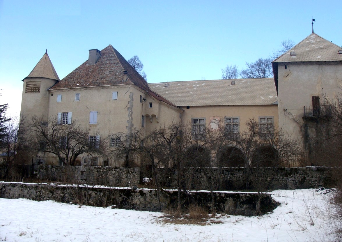 Manteyer, le château, époque Renaissance.